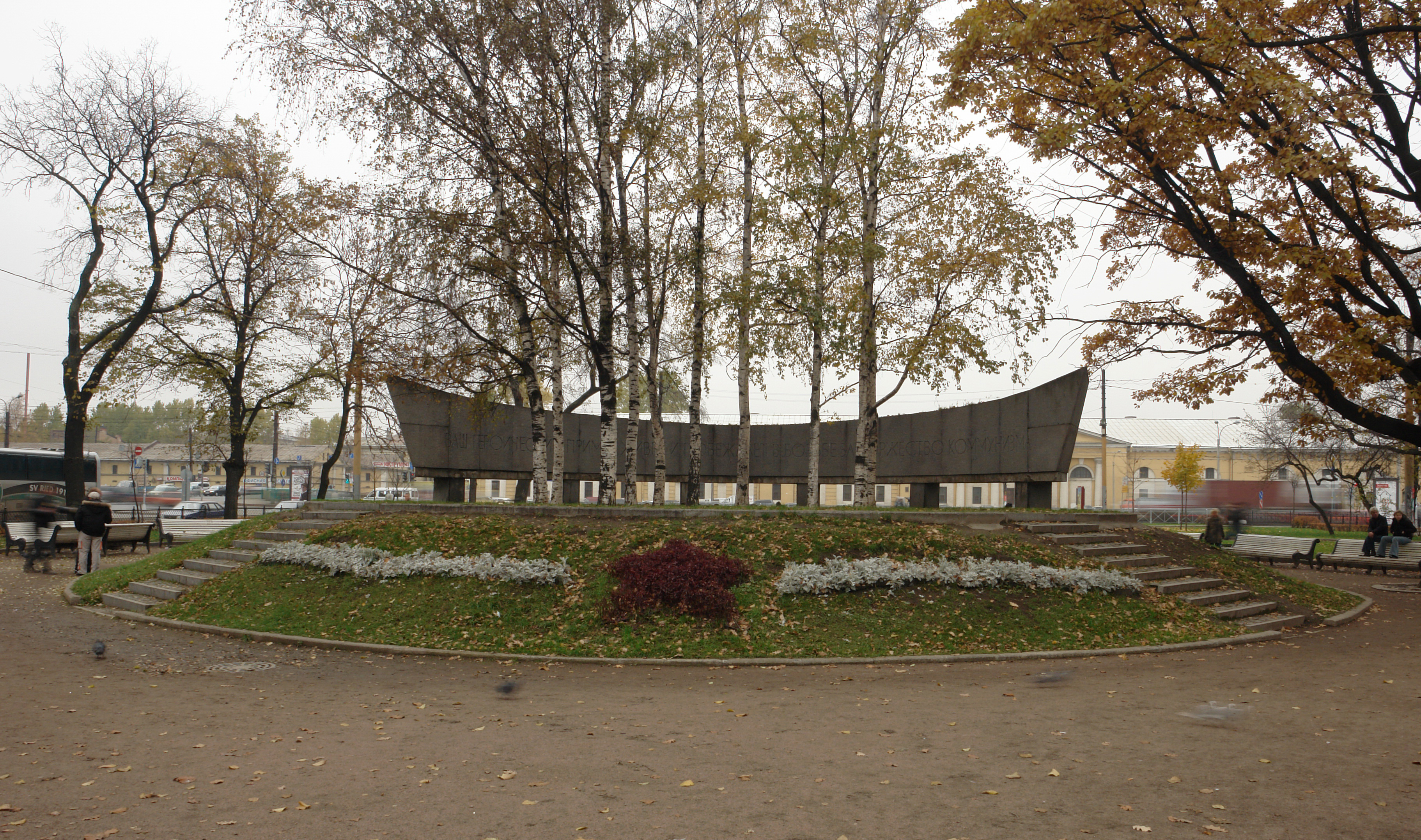 Монумент комсомольцам в сквере перед Балтийским вокзалом (Санкт-Петербург).